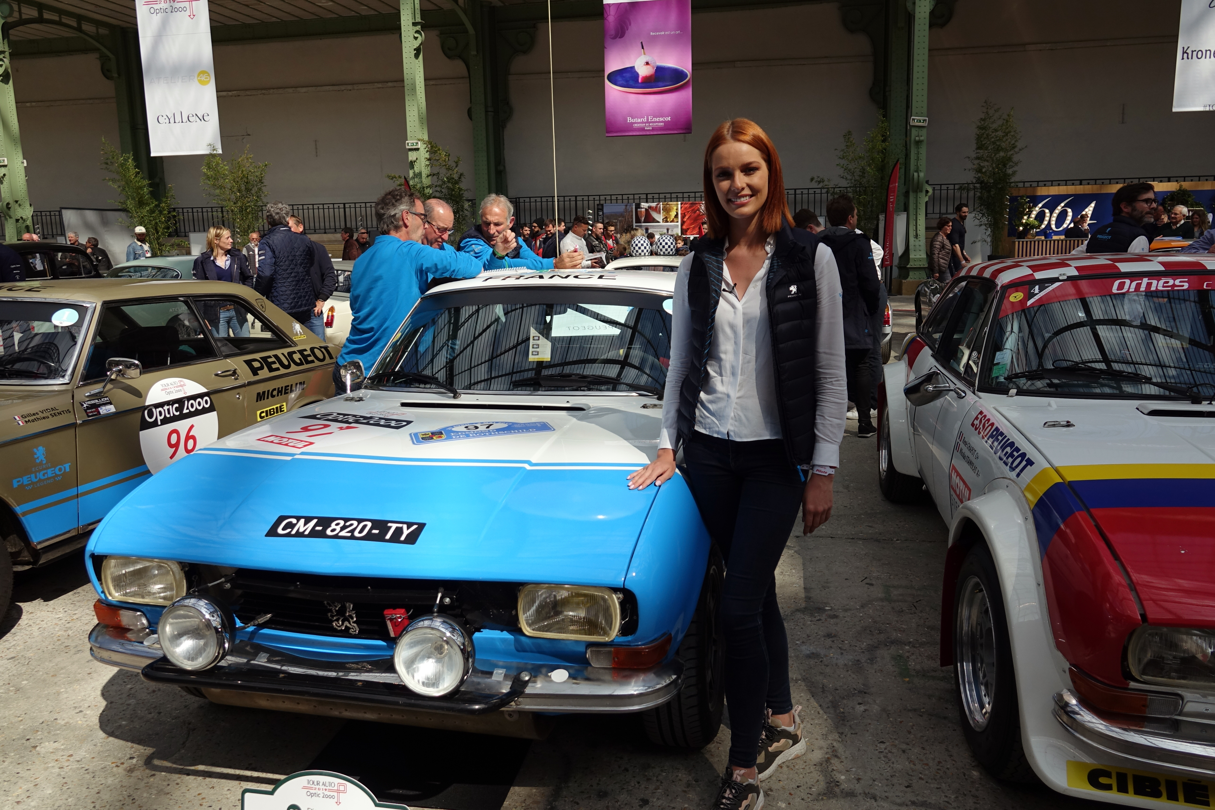 Maëva Coucke au Tour Auto 2019